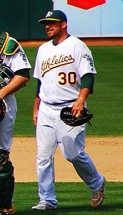 Dana Eveland